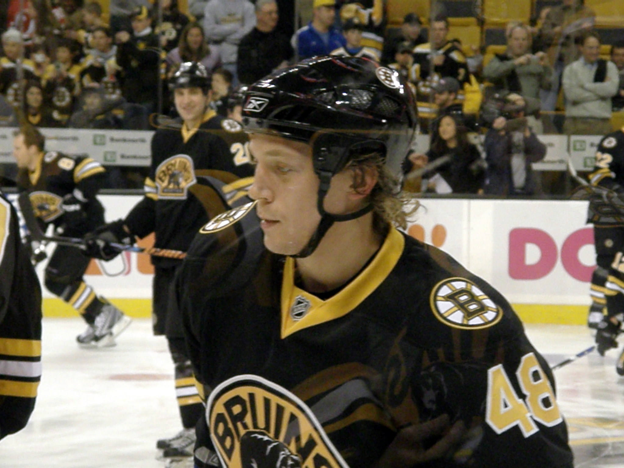 #48 Matt Hunwick